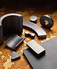 ferriitmagnetite pilt veebist